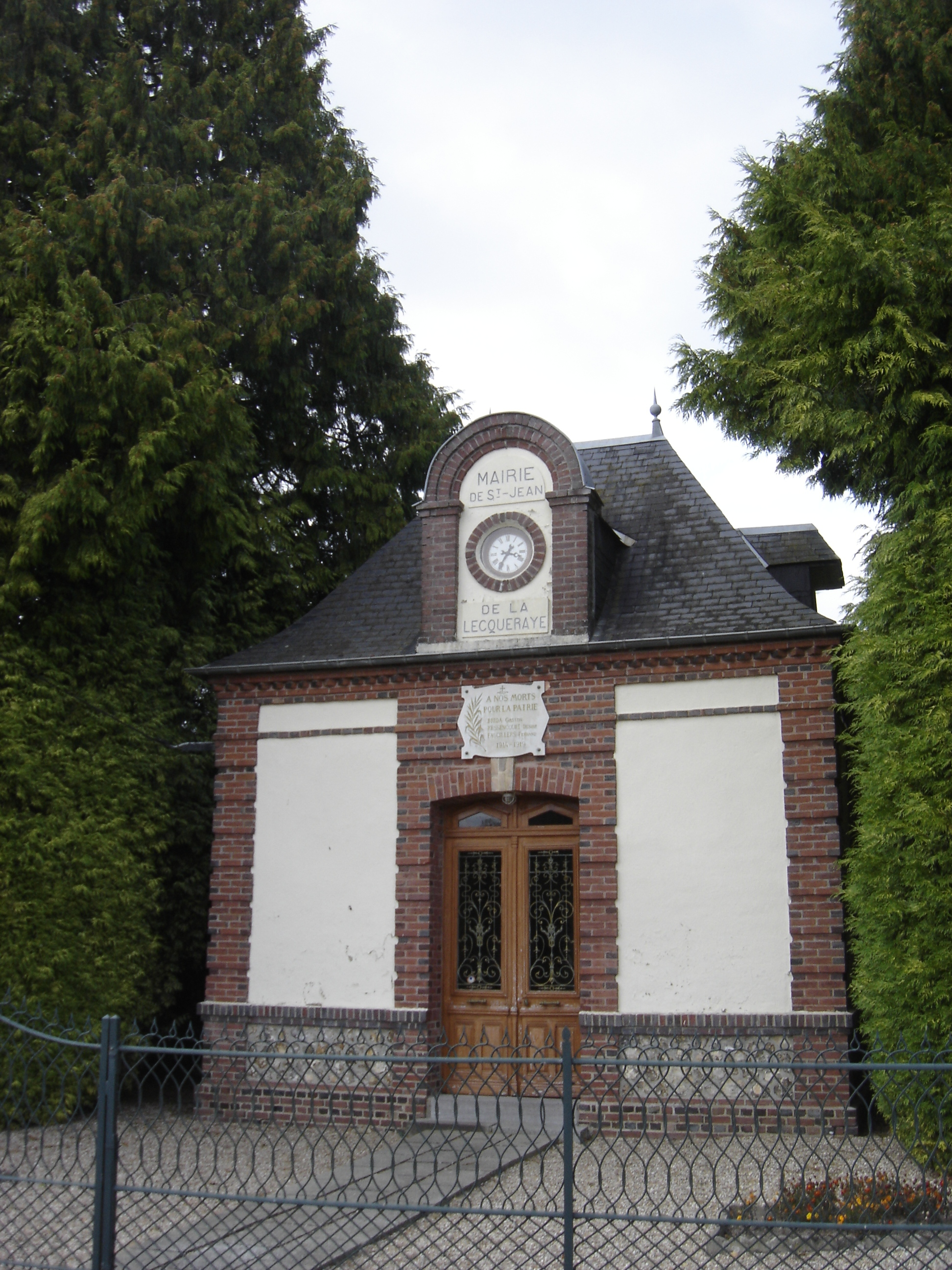 Mairie de Saint-Jean-de-la-Lecqueraye - Eure - France